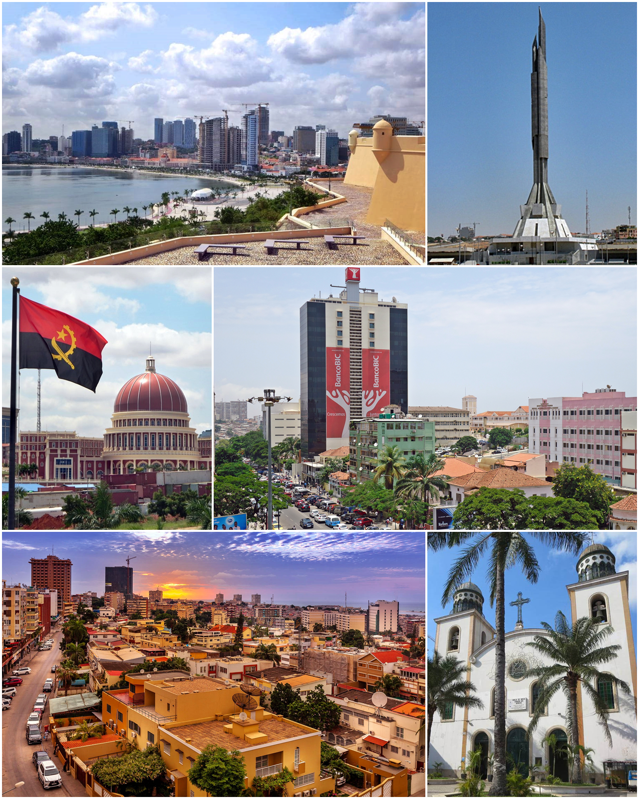 Colagem de fotos da cidade de Luanda, capital de Angola.